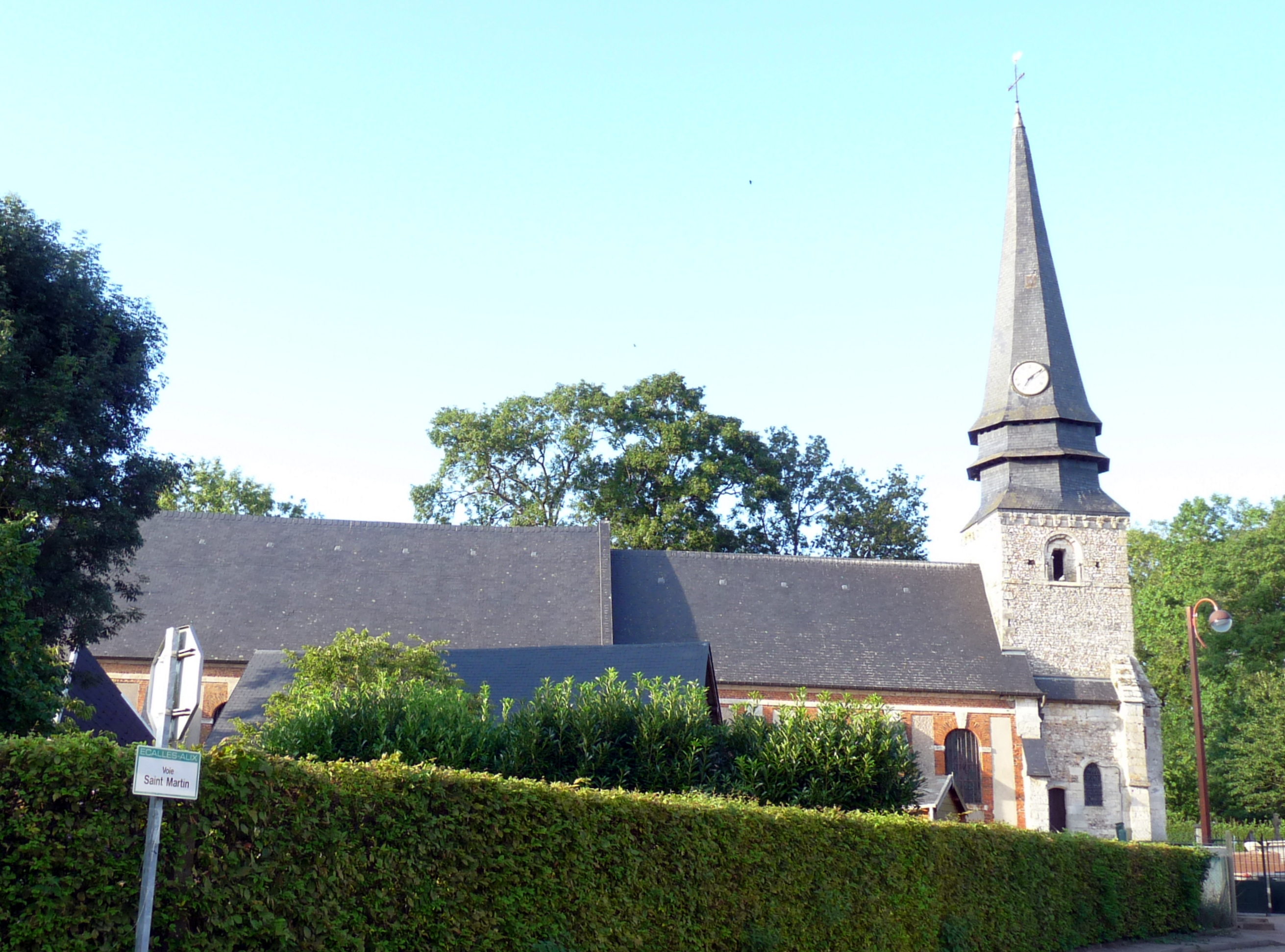 Église Saint-Martin d'Écalles-Alix (Inscrit) .